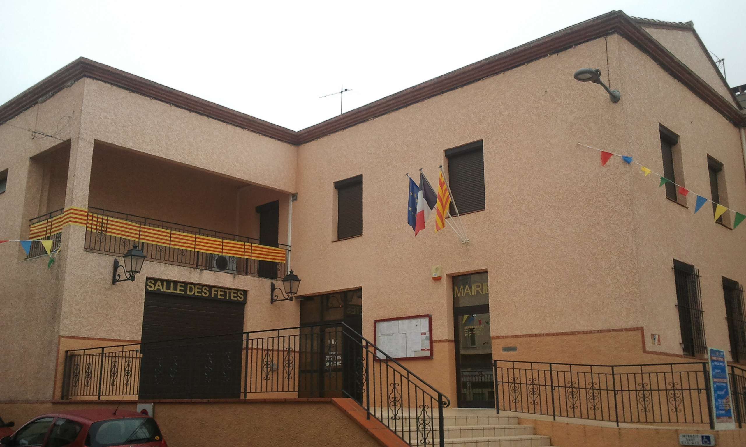 Mairie et salle des fêtes de Villemolaque